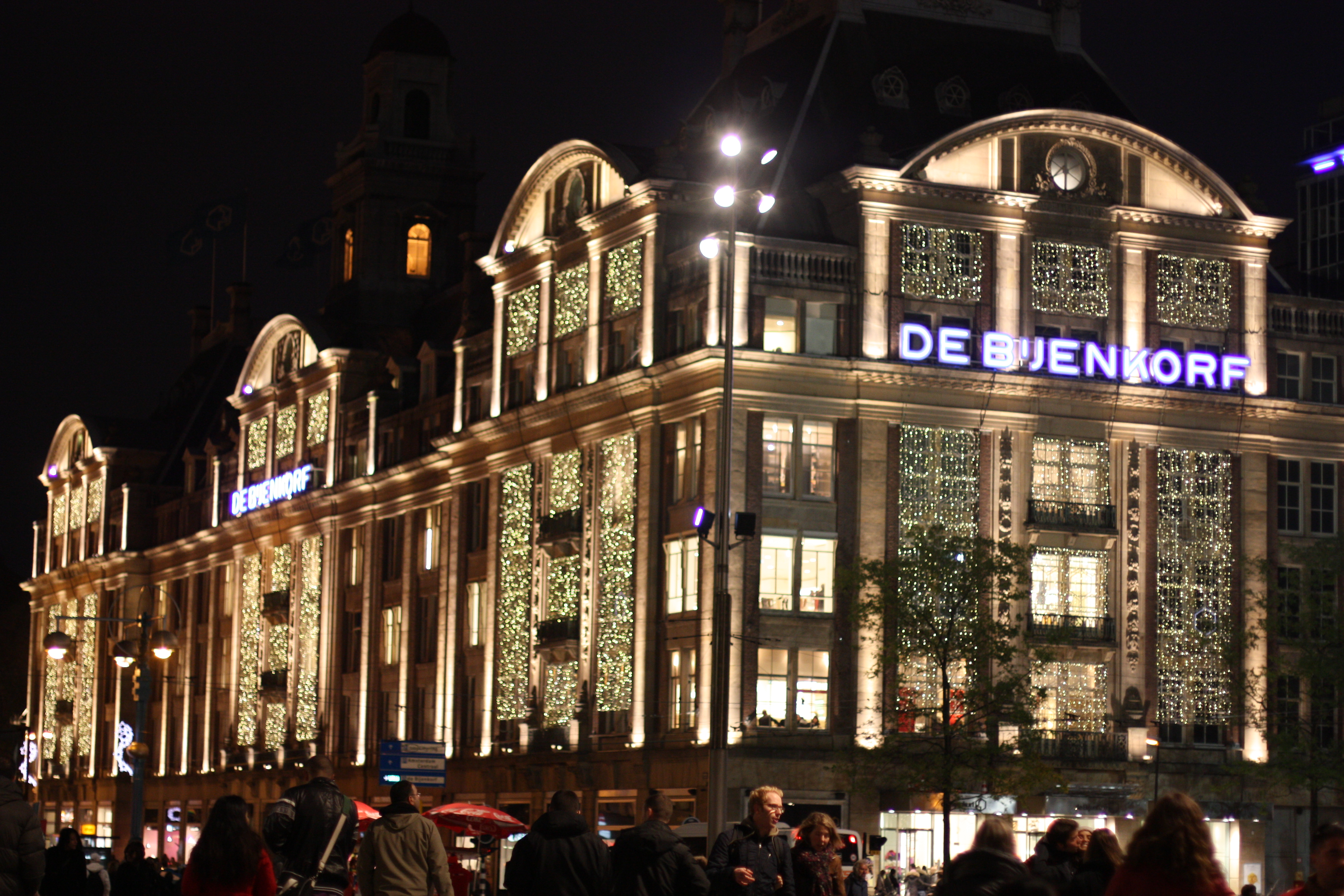 Amsterdam Zentrum; Bijenkorf Amsterdam; De Bijenkorf Kaufhaus in Amsterdam